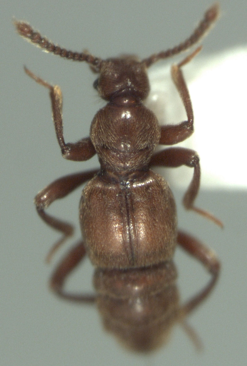 Zeadalmodes myrmecophilus Nomura & Leschen, 2015